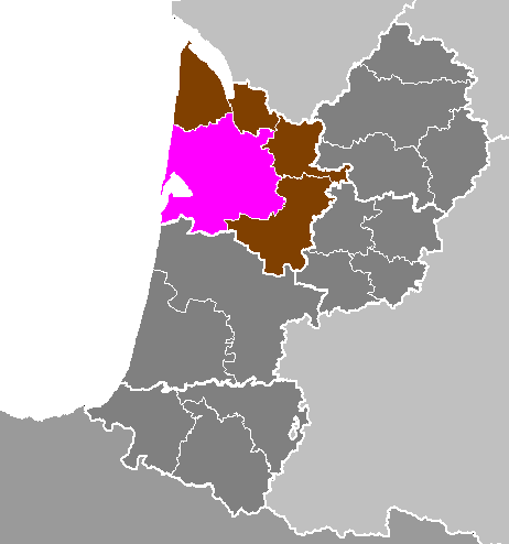 Maps of arrondissements and cantons of France: Département de la Gironde - Arrondissement de Bordeaux.PNG (Région Aquitaine)